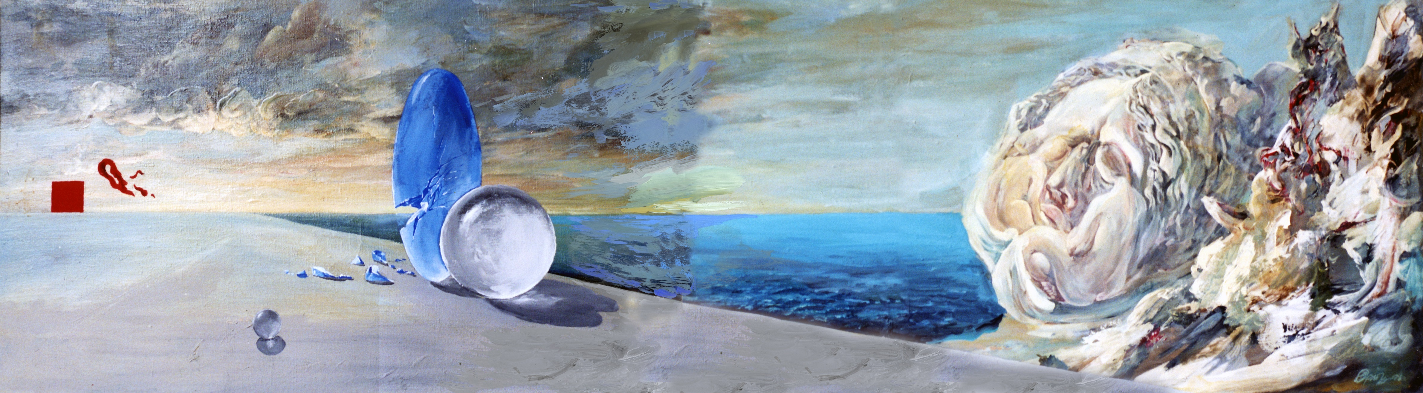 Орловский В. Ф. «Территория сна», 1999 г. Холст, смешанная техника, 60х220см.